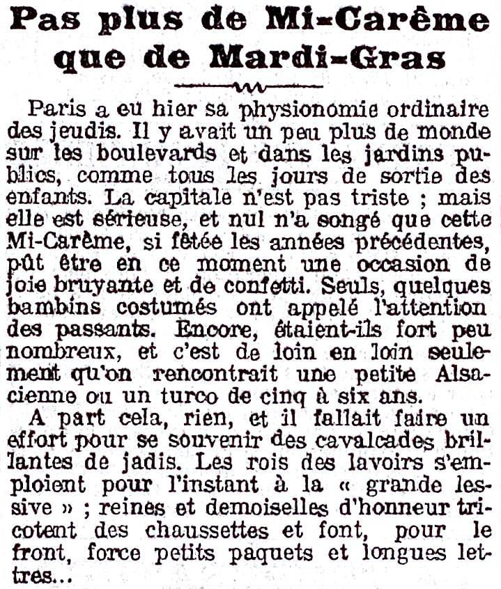 Article sur l'absence de Carnaval de Paris en 1915 pour cause d'interdiction